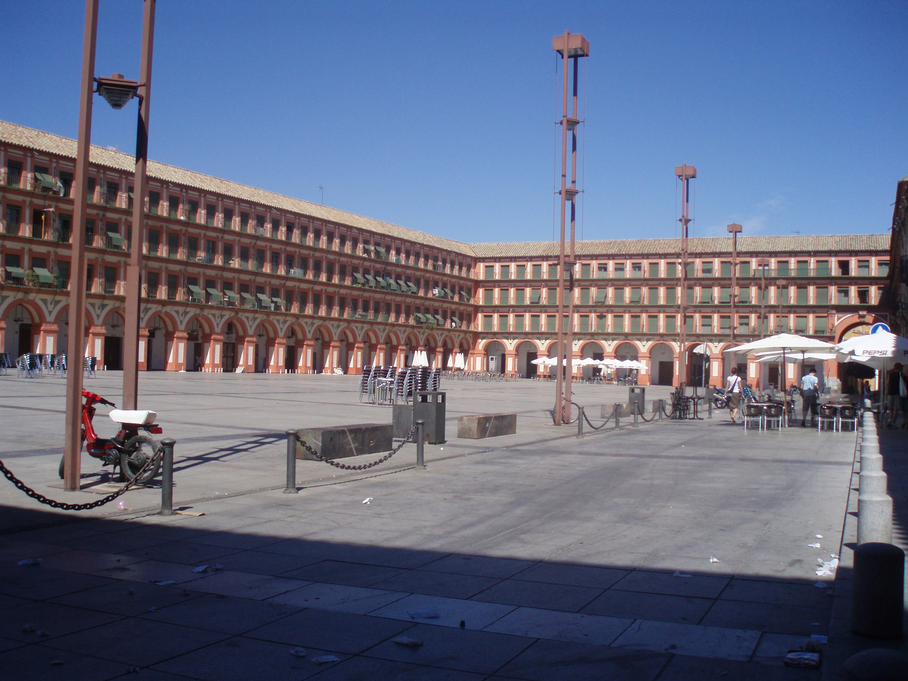 Plaza de la Corredera, en Córdoba (España)